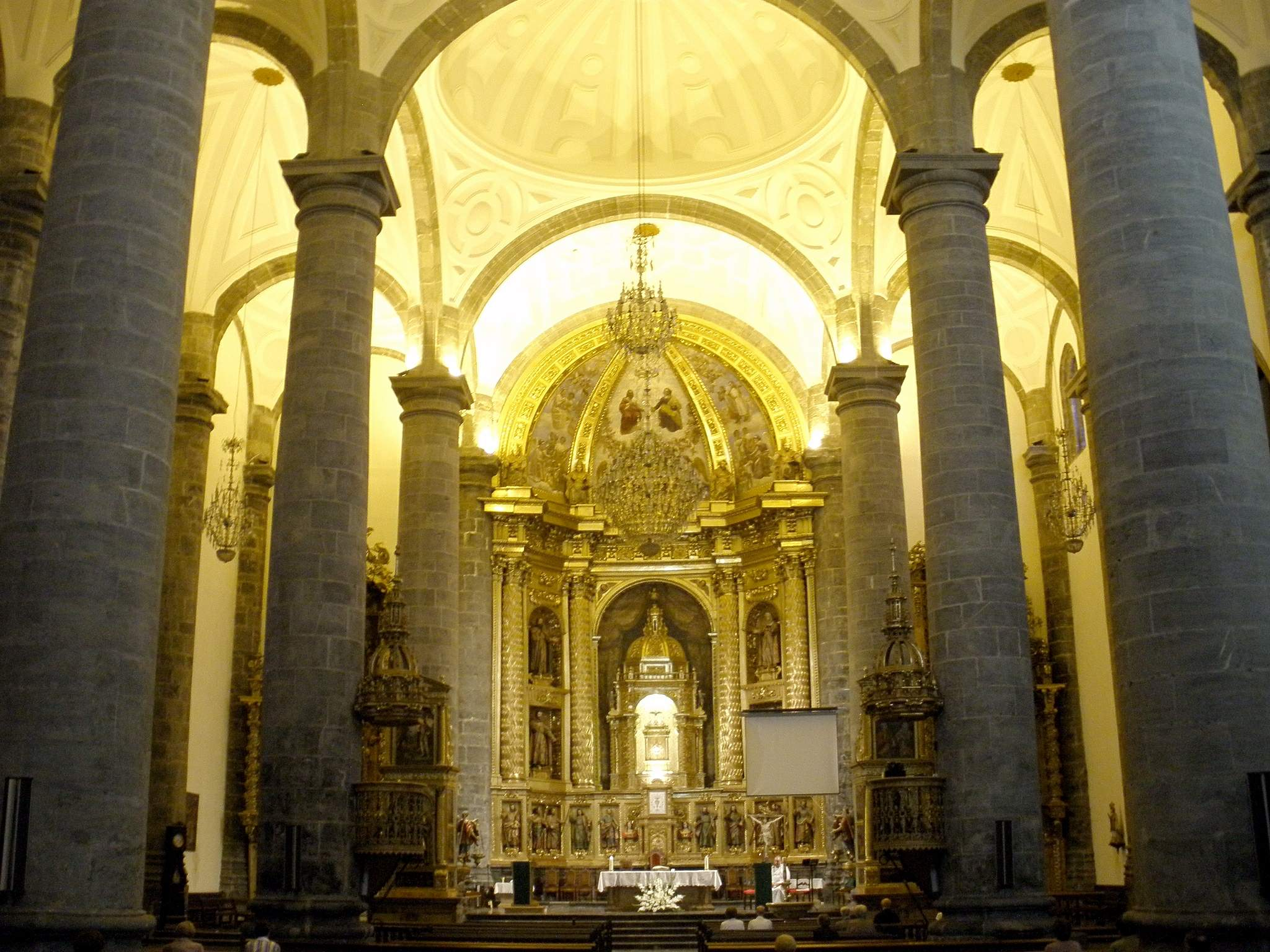 Azkoitia (Gipuzkoa) - Iglesia de Santa Maria la Real